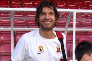 Picture of Geert den Ouden.